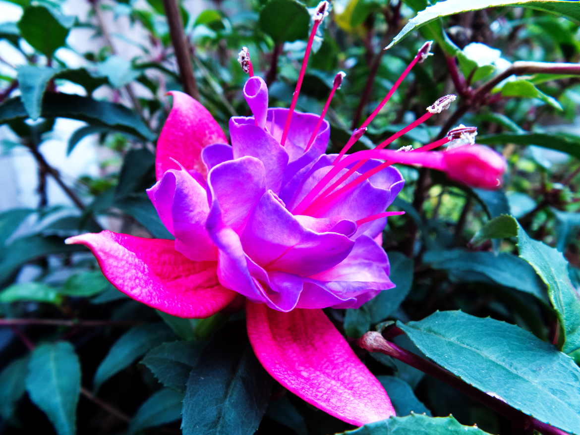 Фуксия